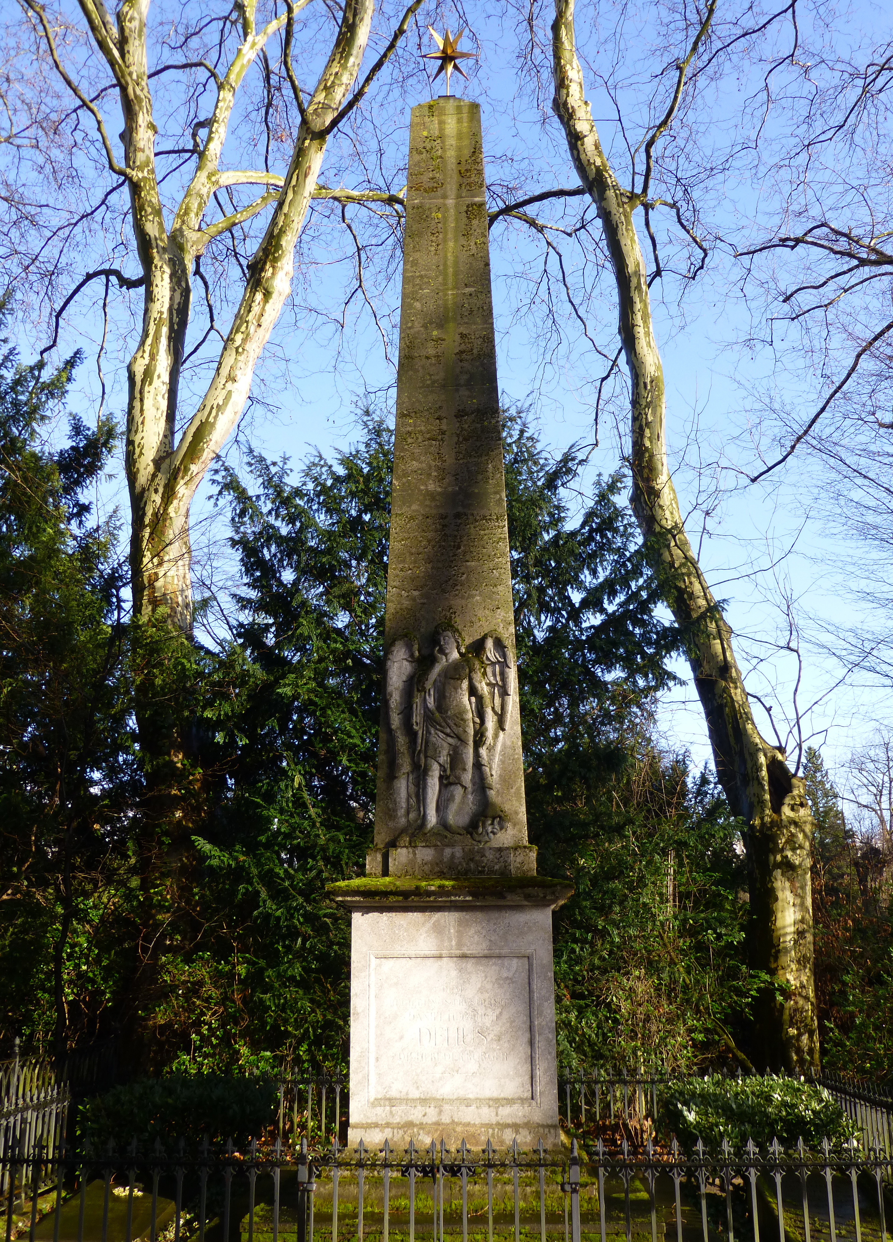 Grabmal von Daniel Heinrich Delius auf dem Kölner Melaten-Friedhof. Künstler/Bildhauer: Peter Joseph Imhoff.